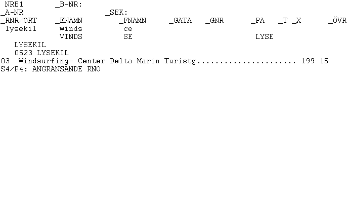 Nummerbyråärendet i Televerkets Administrativa Datasystem. Skärmdump från mitten av 1990-talet.